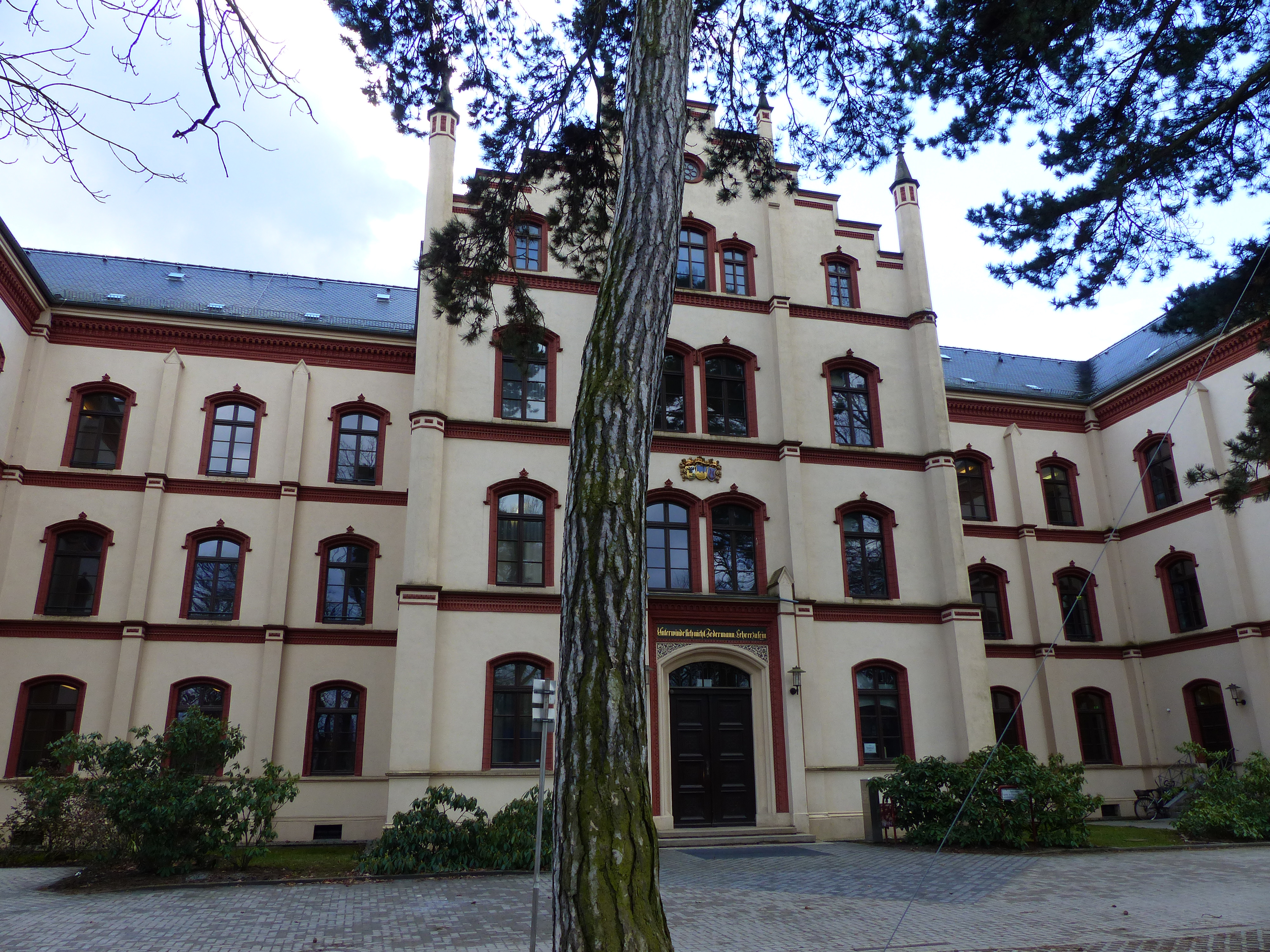 Berufsschulzentrum (ehem. Landständisches Seminar), Schilleranlagen 1, Bautzen